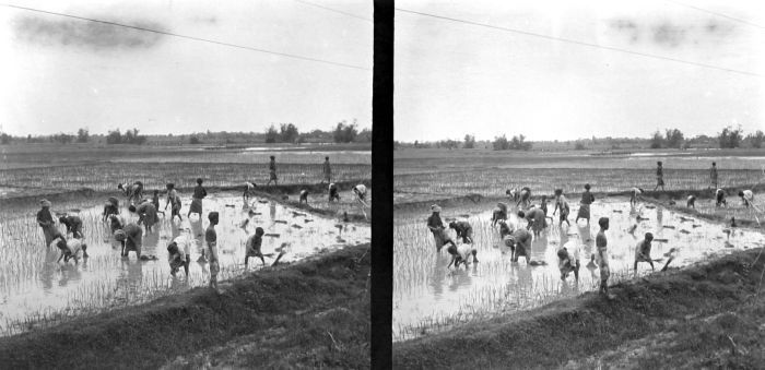 Negatief. Het uitplanten van de padi, Madoera